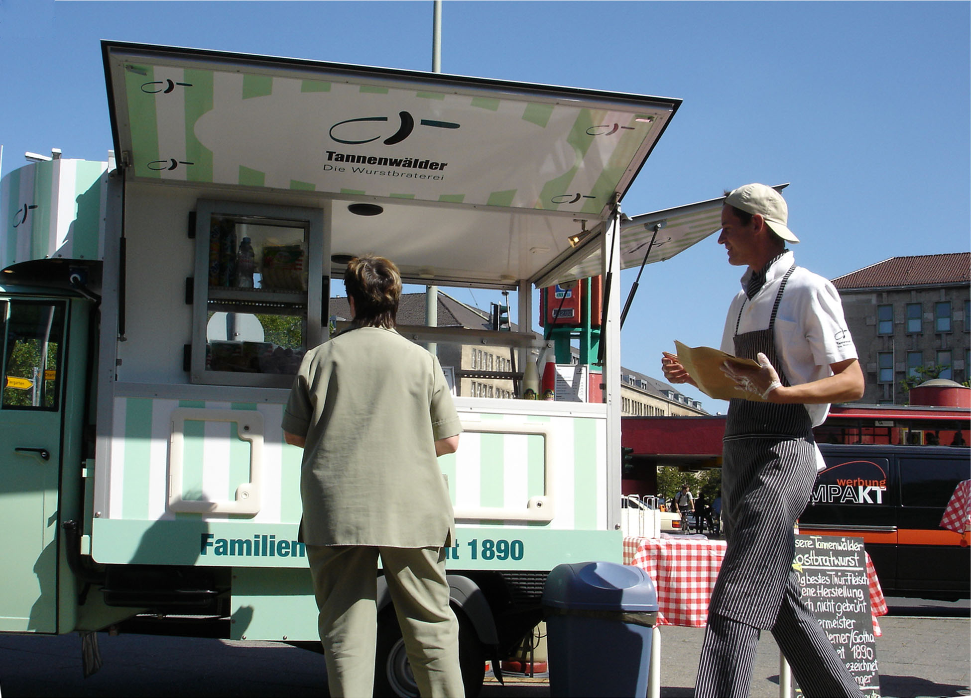 Thüringer Rostbratwurst Tannenwälder Wurstbraterei Thüringer Rostbratwurst in Berlin